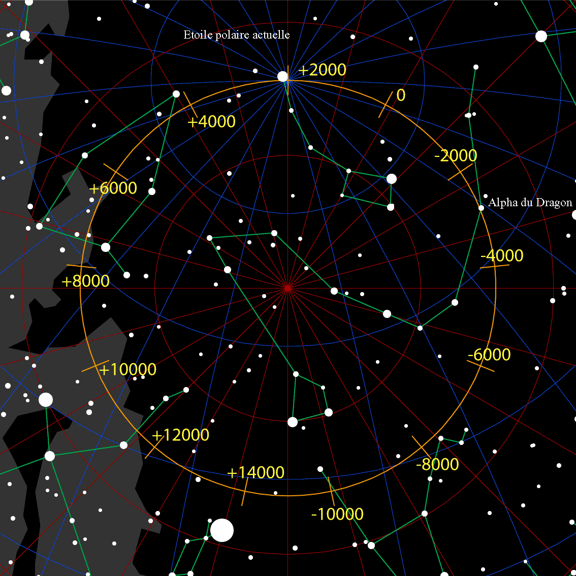 Mise en évidence de la position d'alpha du dragon et de l'étoile polaire